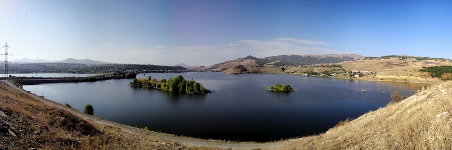 Ахпюракское водохранилище возле Раздана